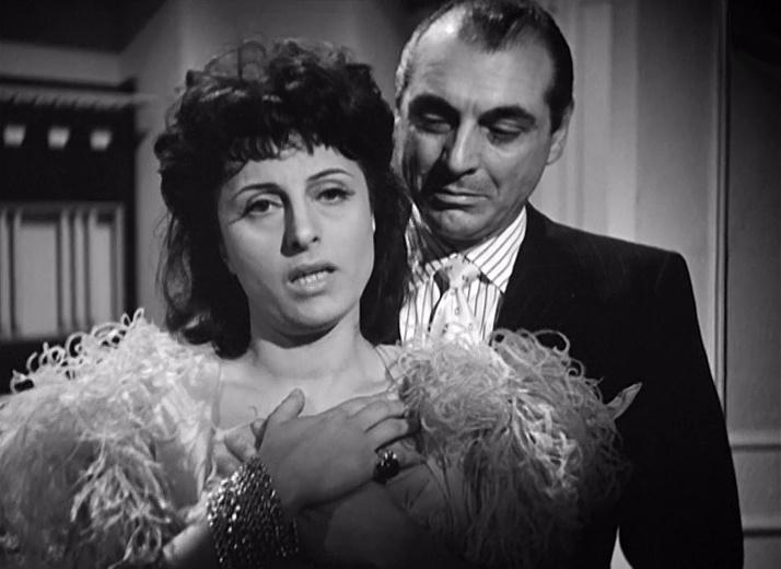 Anna Magnani and Mino Doro in a scene of film Il bandito